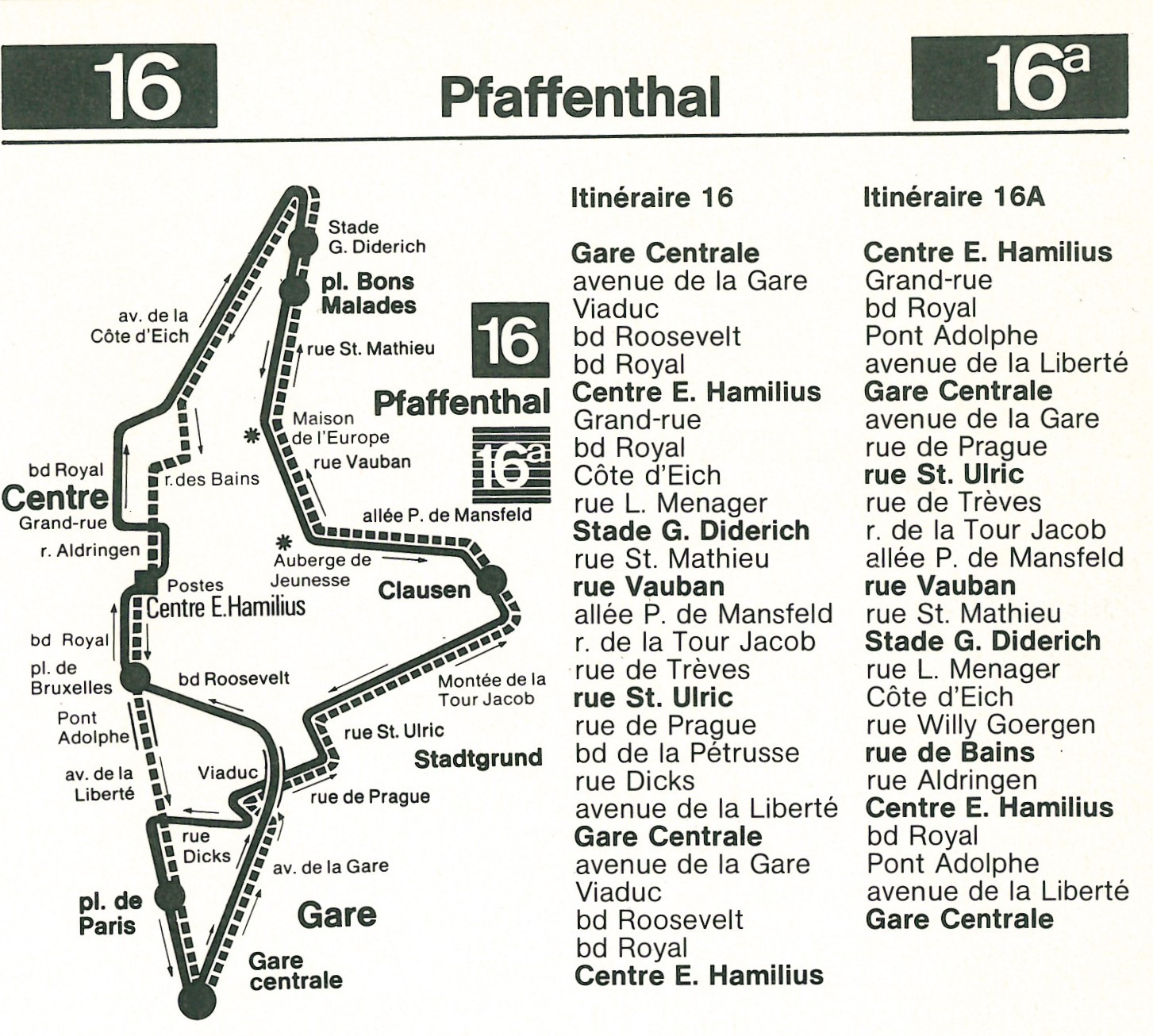 Streck vun den AVL-Linne 16&16A (1987)